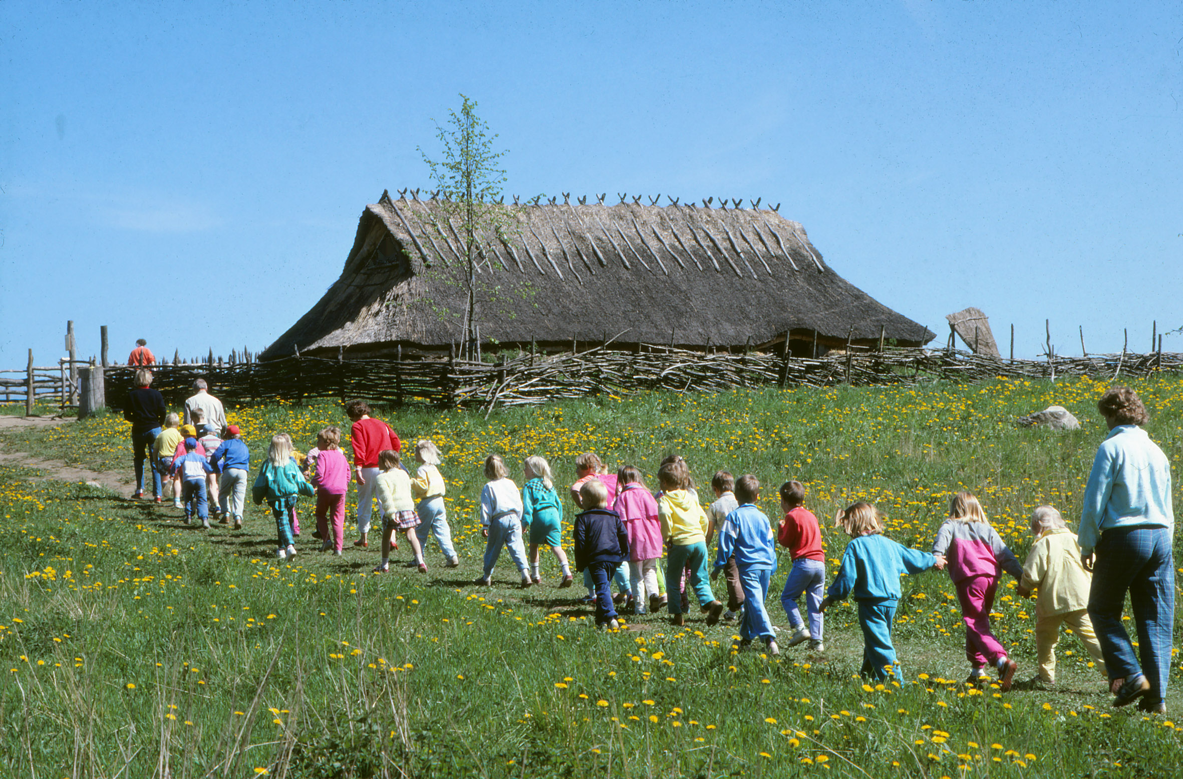 Stenåldersprojektet Forntid i Nutid i Skånes djurpark, Sverige